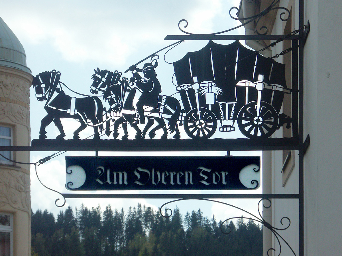 Schwarzenberg/Erzg.: Am Oberen Tor